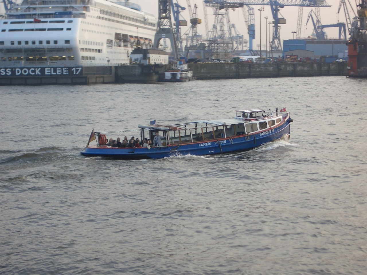 Barkasse im Hamburger Hafen, selbst fotografiert, GNU-FDL.